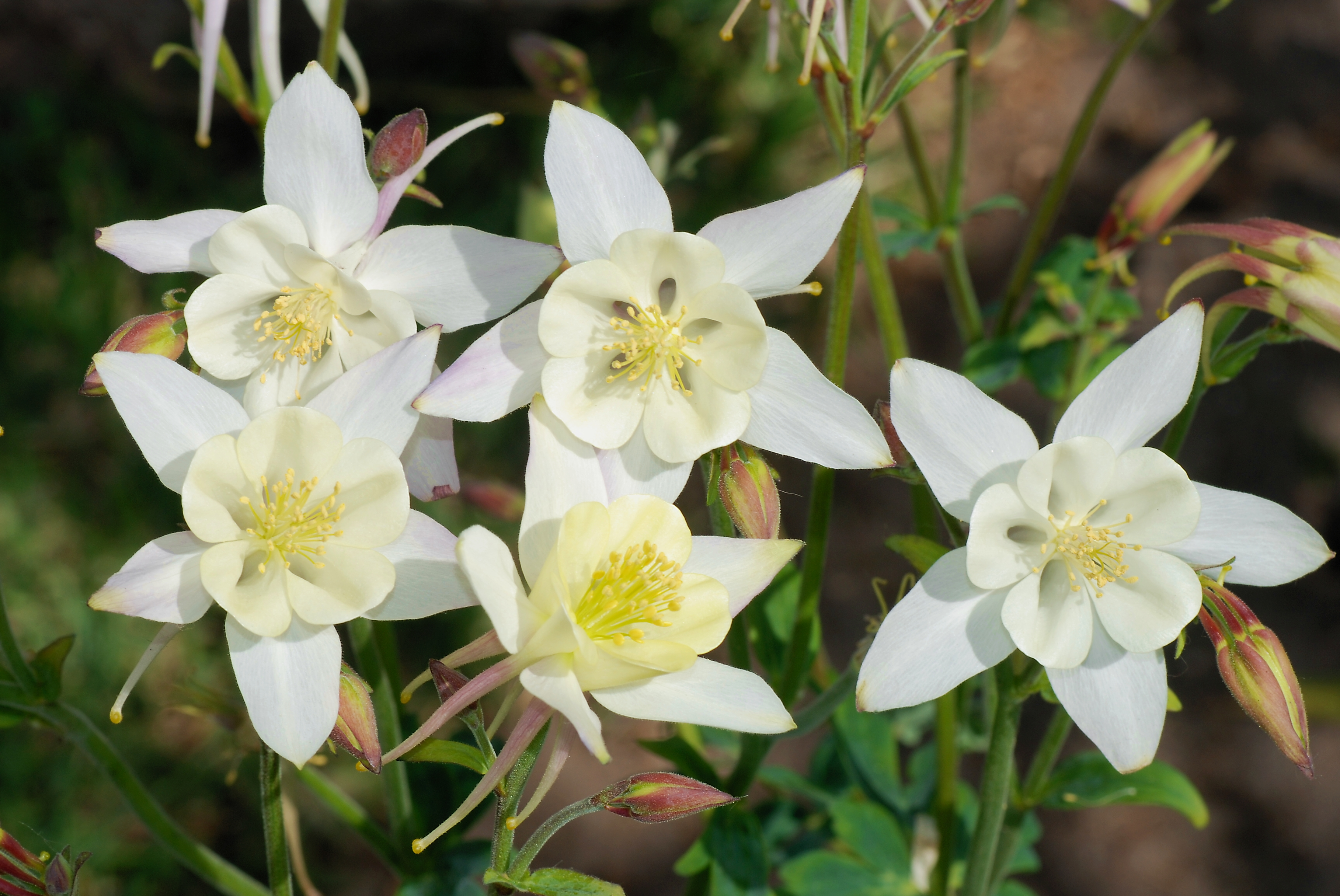 Aquilegia caerolea (Columbine)